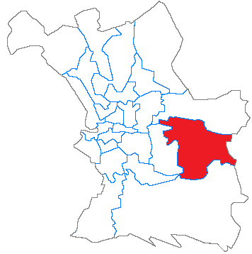 Situation du canton dans la ville de Marseille